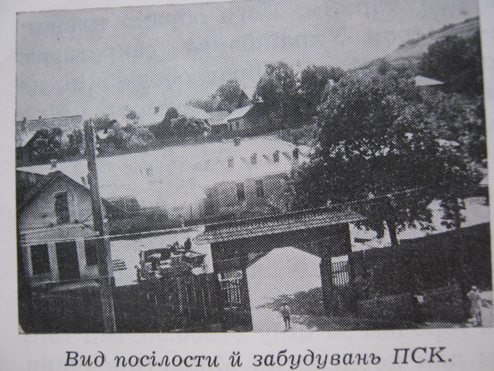 Будівля "Повітового Союзу кооператив". Бучач